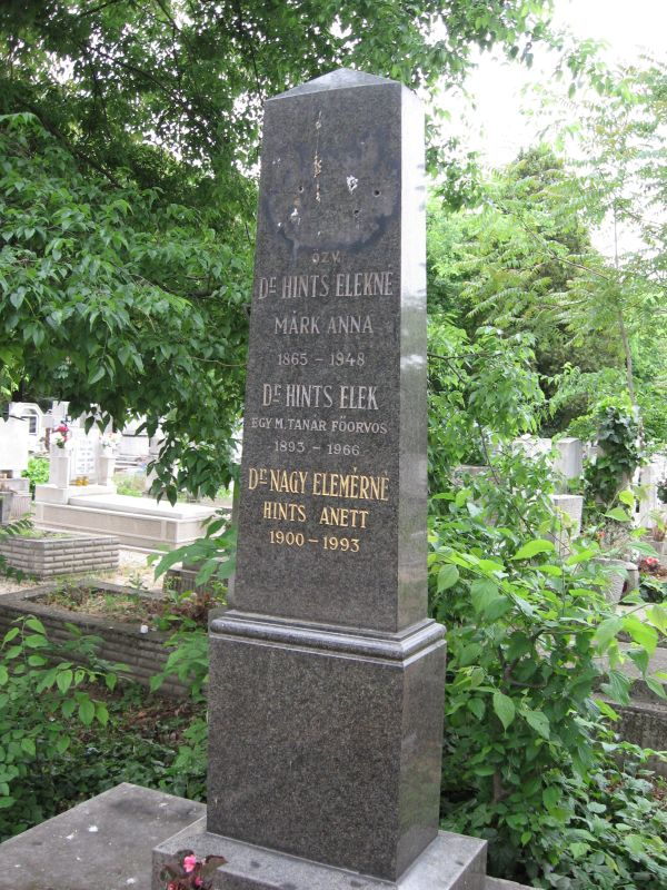 Hints Elek (Marosvásárhely, 1893. február 7. – Budapest, 1966. július 21.) orvos, orvostörténész és családjának sírja Budapesten. Új köztemető: 49/1-97/98.